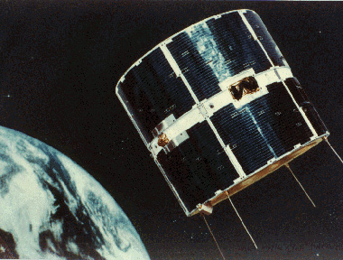 COS-B Satellit.